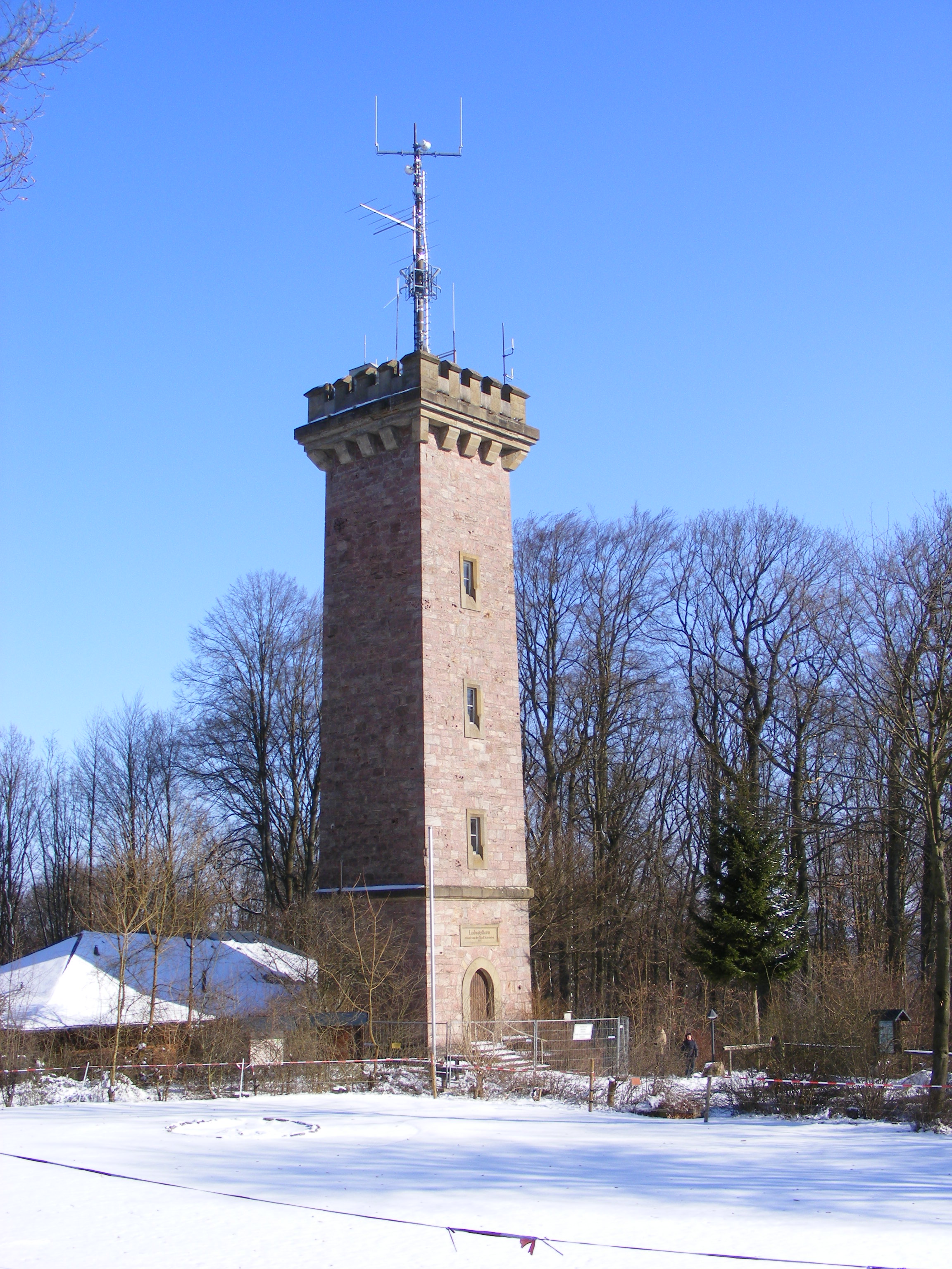 Bad Kissingen - Ludwigsturm, Außenansicht 2010.